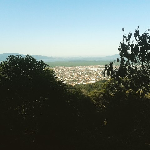 Paisagem com vista do bairro Iririú e aos fundos a Baía da Babitonga.